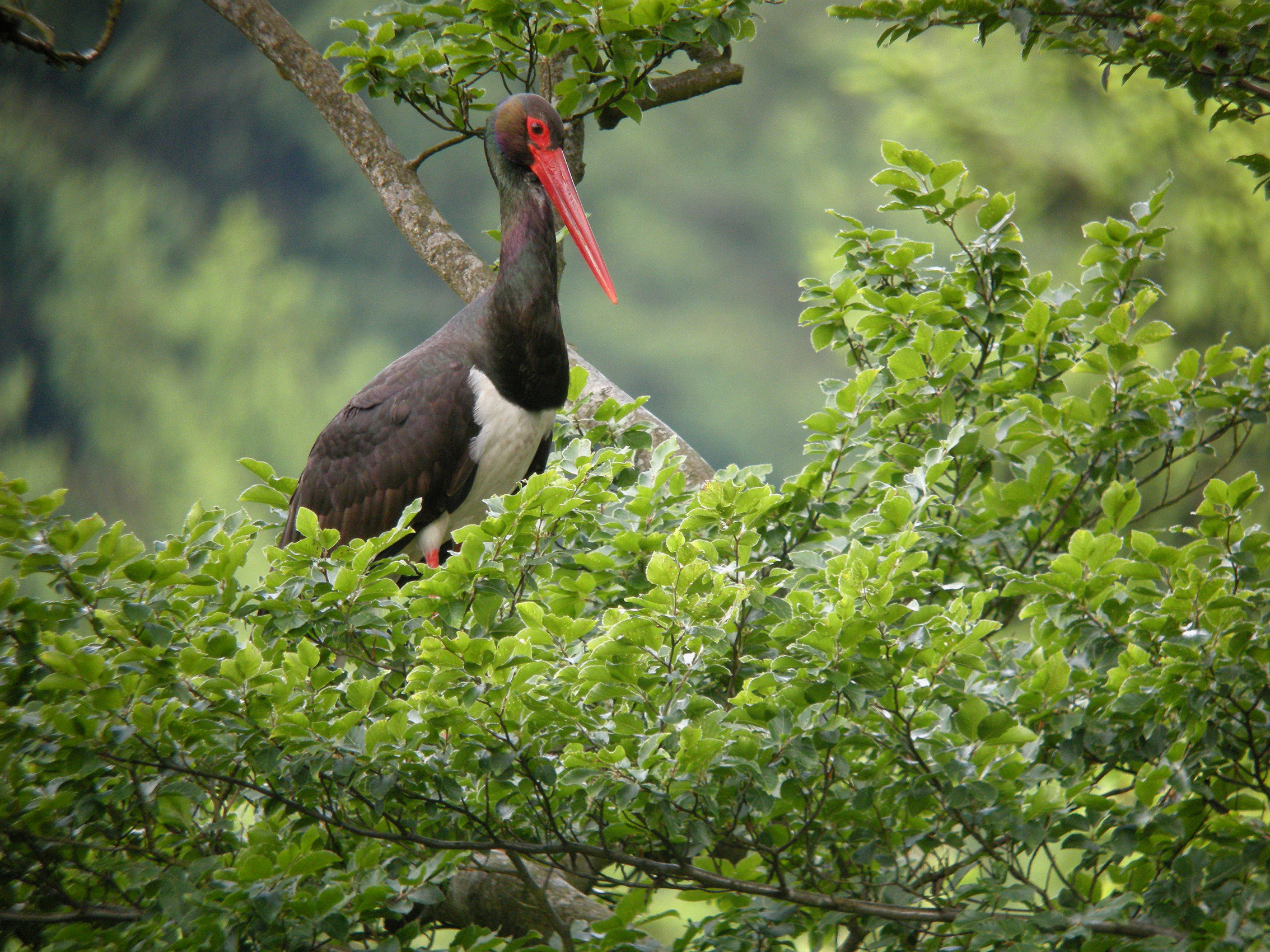 Ciconia nigra, Rocherath, Ostbelgien